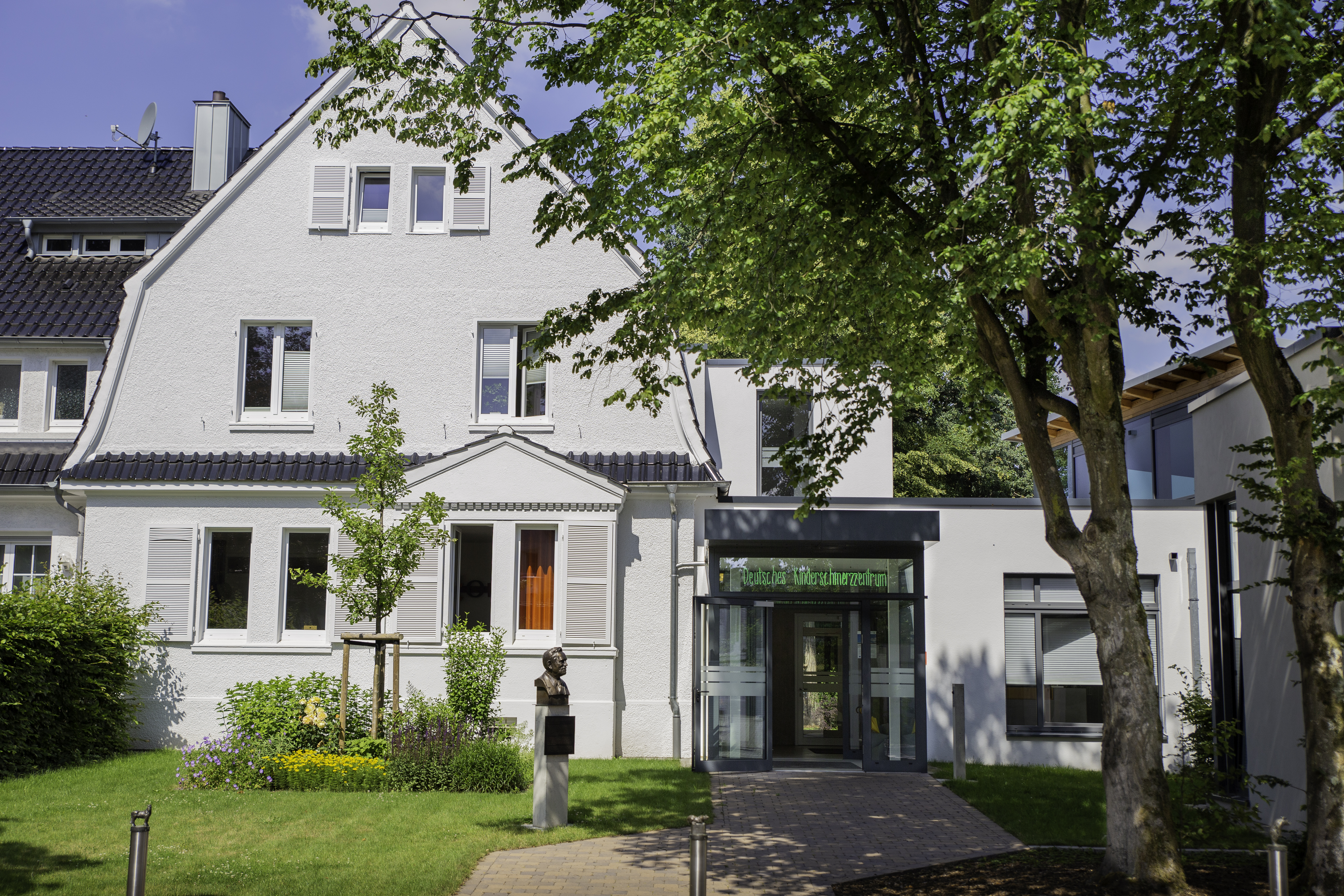 Außenaufnahme Deutsches Kinderschmerzzentrum (2020)